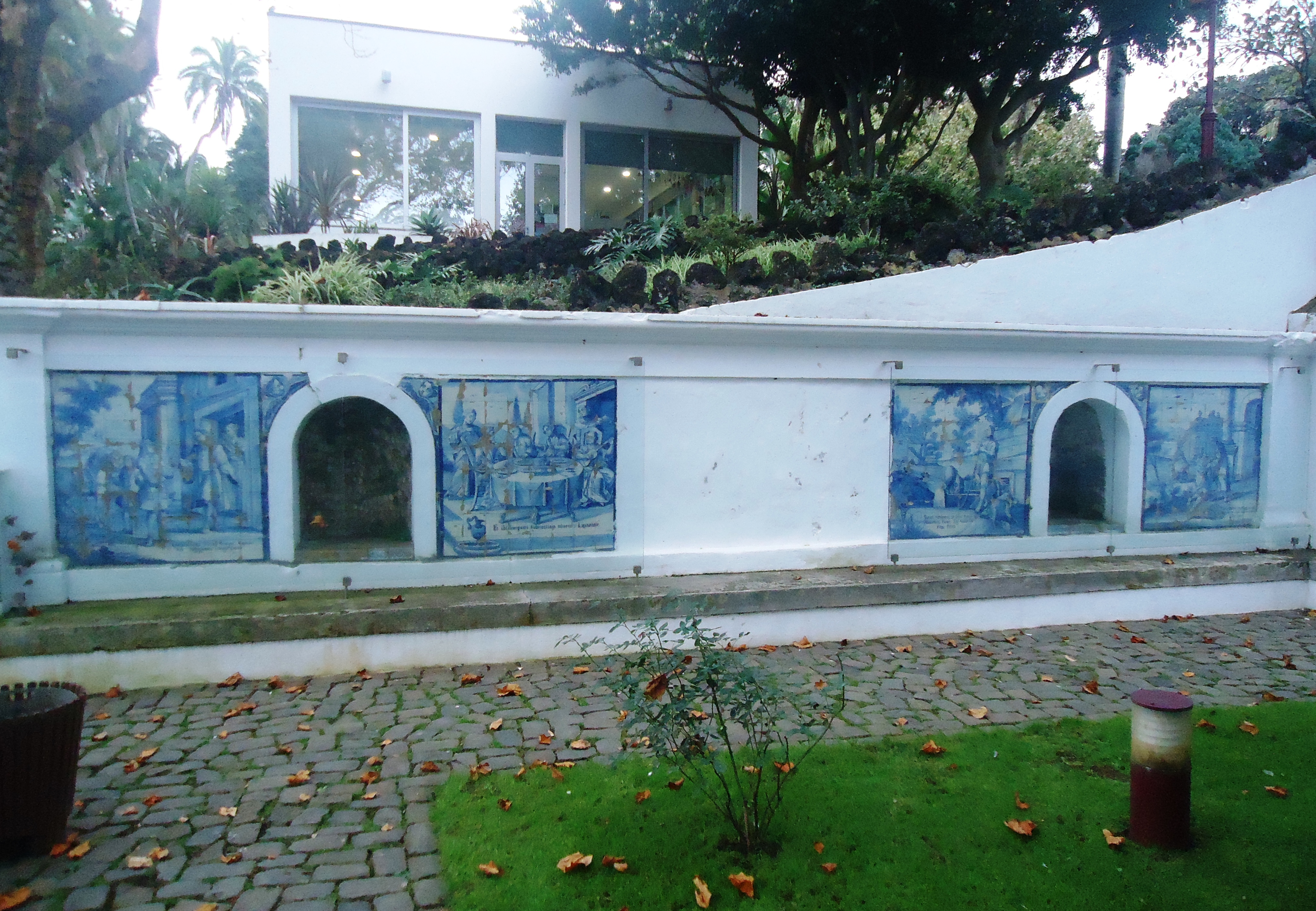 Jardim Duque da Terceira, Angra do Heroísmo, ilha Terceira, Região Autónoma dos Açores, Portugal: vista do conjunto de 4 painéis de azulejos com a parábola bíblica do Filho Pródigo (Lisboa, c. 1740), pertencente à antiga cerca do Convento de São Francisco.